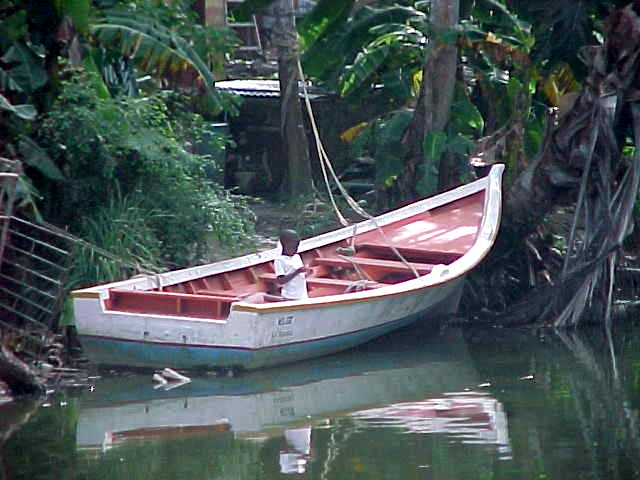 Chirimena pueblo costero de la región de barlovento en el estado Miranda - Venezuela (2000)